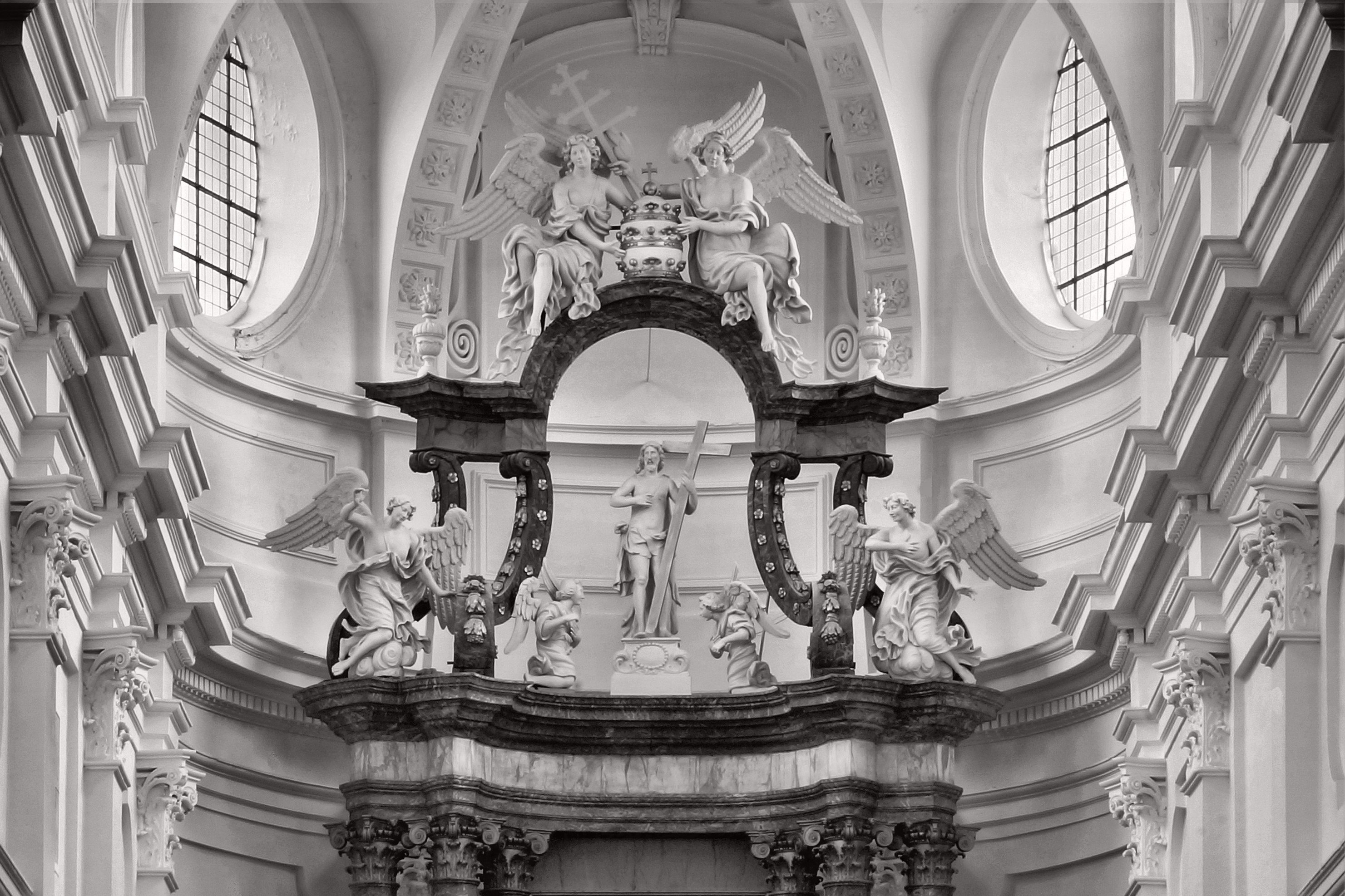 Collegiale kerk Sint-Begga (Andenne) - Triomfgroep boven het hoofdaltaar